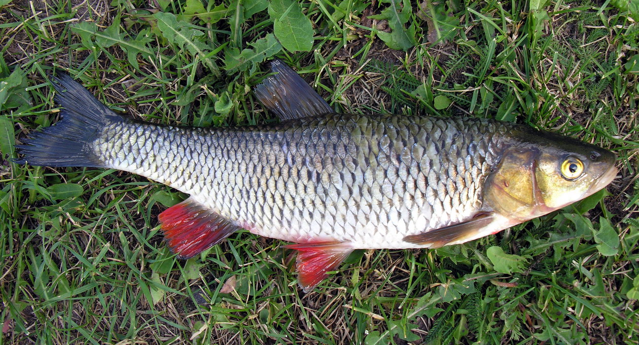 Šapalas (Leucisus cephalus) Šeima. Karpinės (Cyprinidae) Foto: Algirdas, 2006 m. liepos 1 d., Lietuva